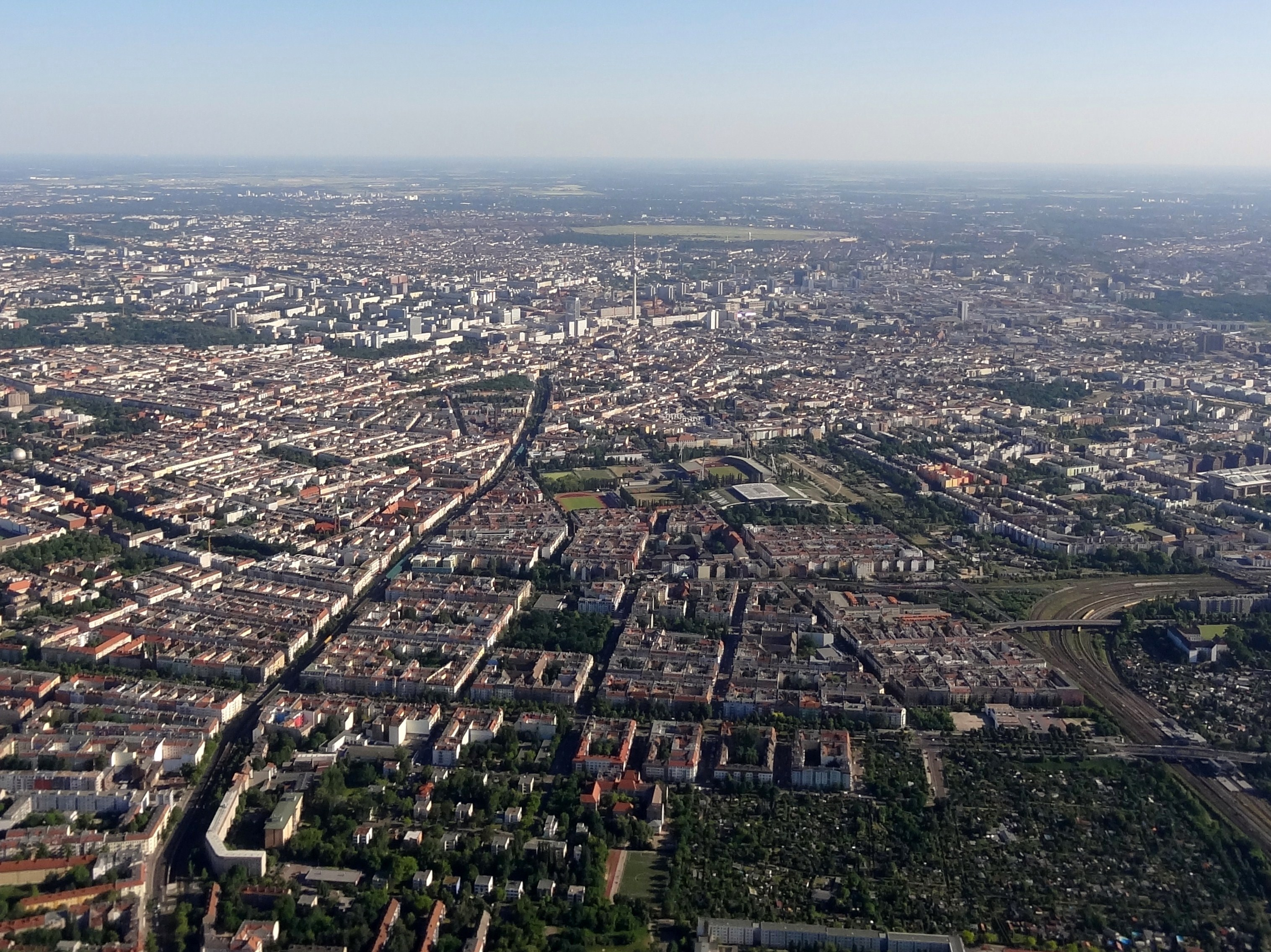 Blick auf die Bornholmer Straße zwischen der Schönhauser Allee und den Bahnanlagen am Nordkreuz, Berlin, Deutschland